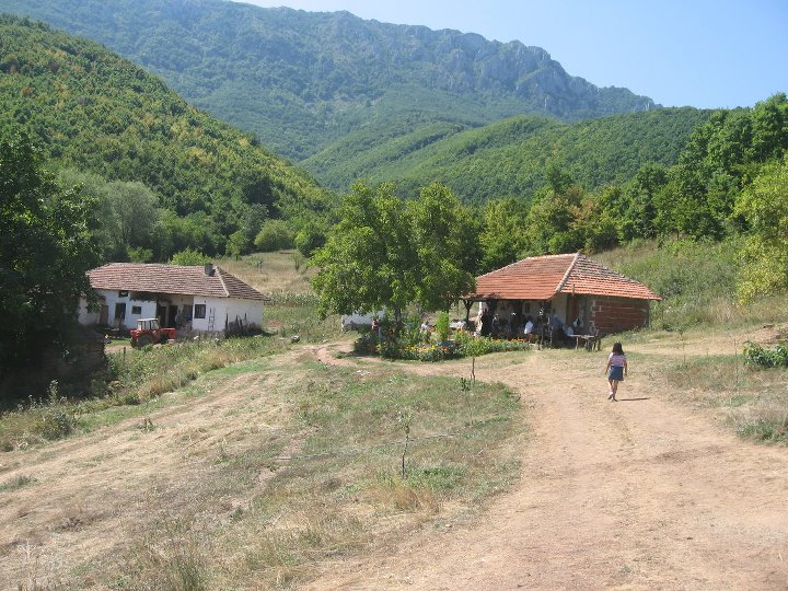 Srpski (latinica): Manastir Uspenije Presvete Bogorodice u Veti. Manastirski konaci